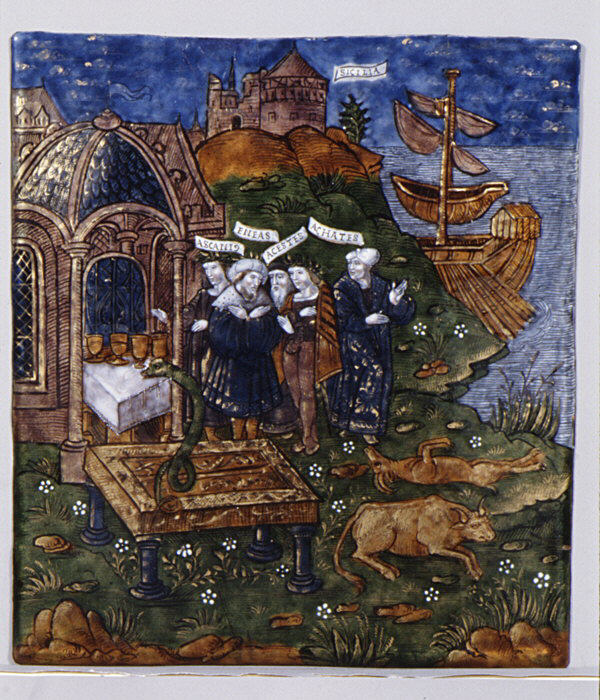 French, Limoges; Plaque; Enamels